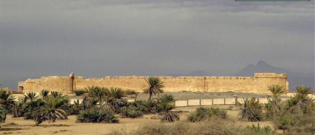 مصرى: مويلح